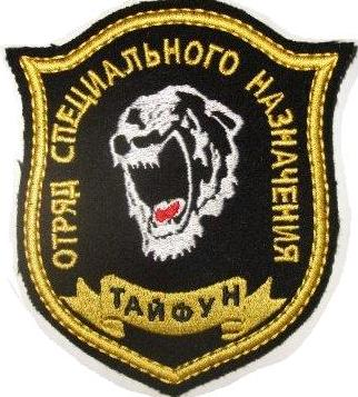 Эмблема 21 ОСН "Тайфун"